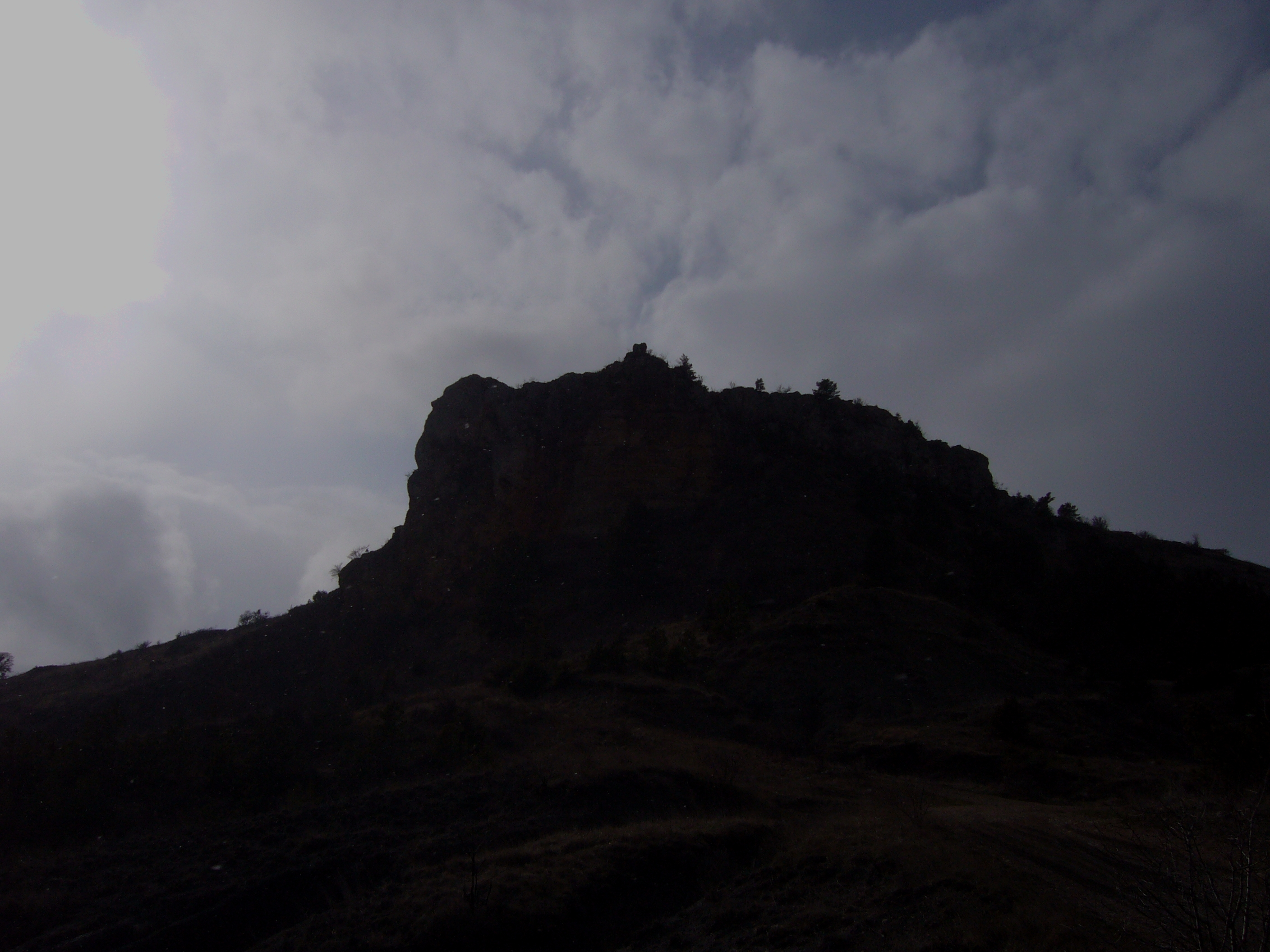 Chastel Vieil, commune de Barjac (Lozère, France)